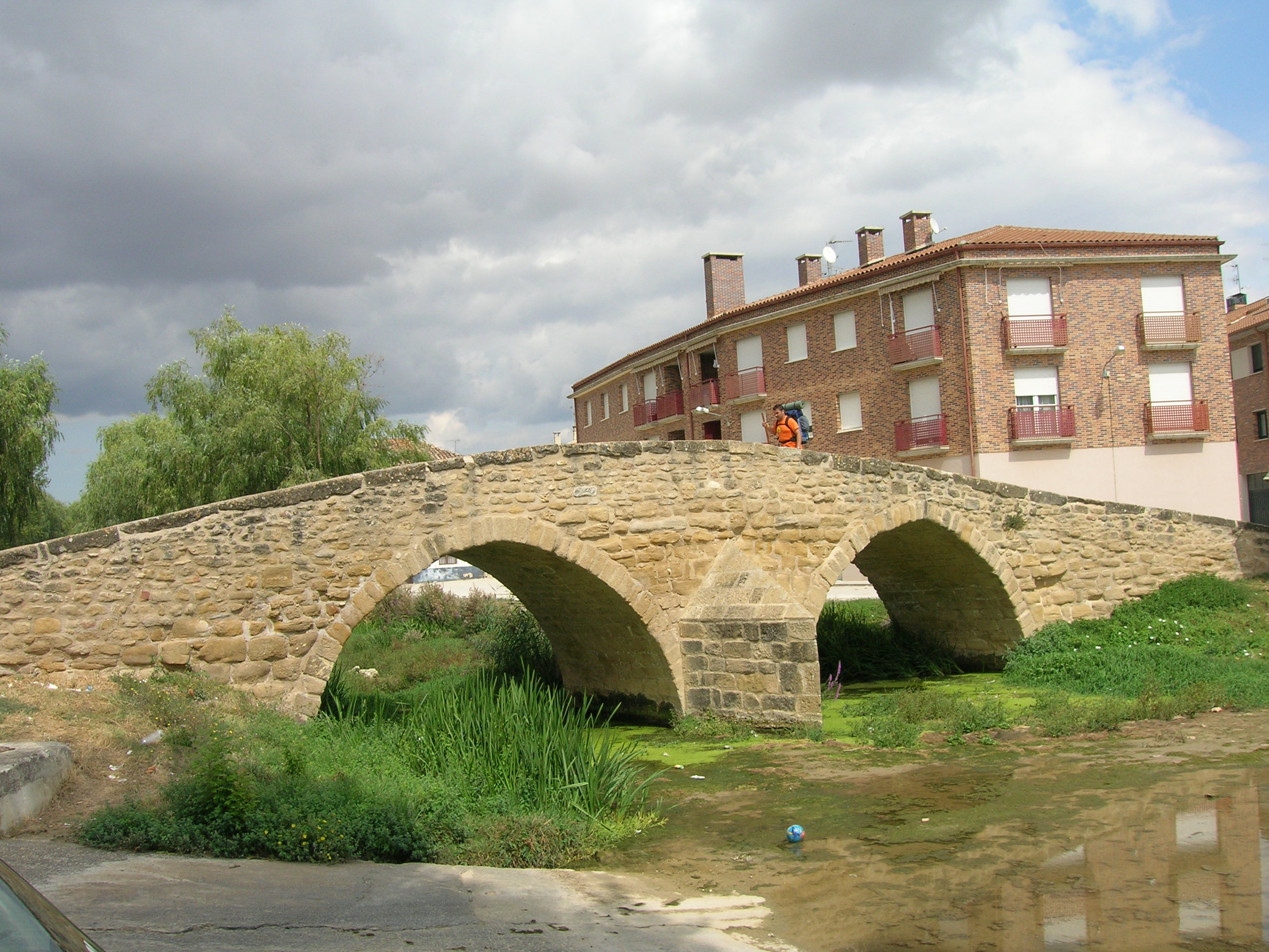 Puente románico de dos ojos sobre el río Iranzu. Vuela hasta esta localización (Necesitas Google Earth )